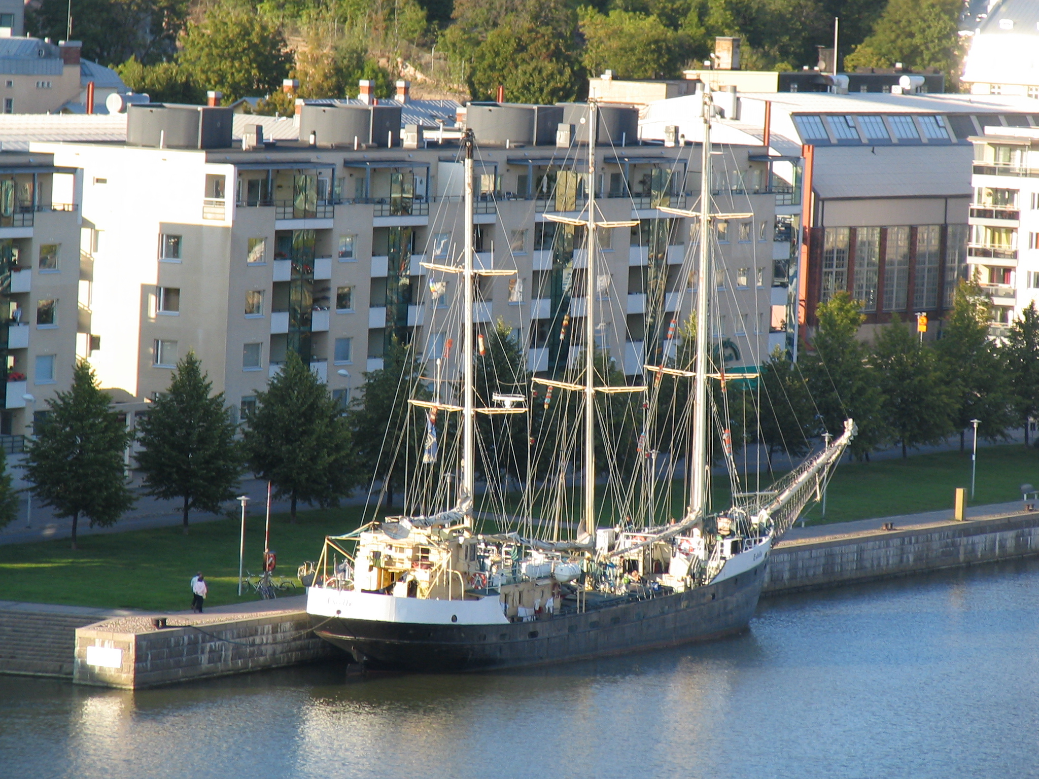 S/v Estelle seen from Korppolaismäki